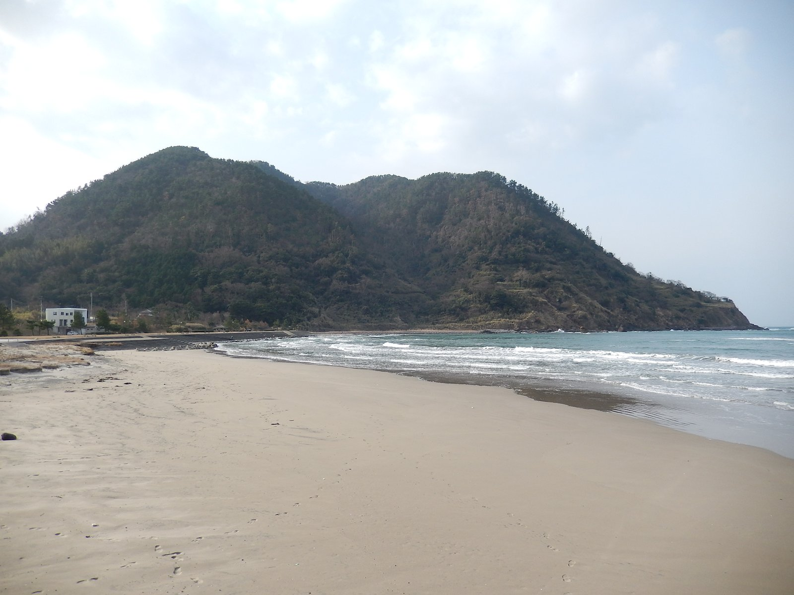 鳥取県岩美町の大谷海岸から見た駟馳山